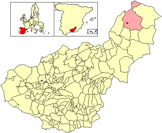 Situación de la localidad de La Parra (en el municipio de Huéscar) respecto a la provincia de Granada, en España.